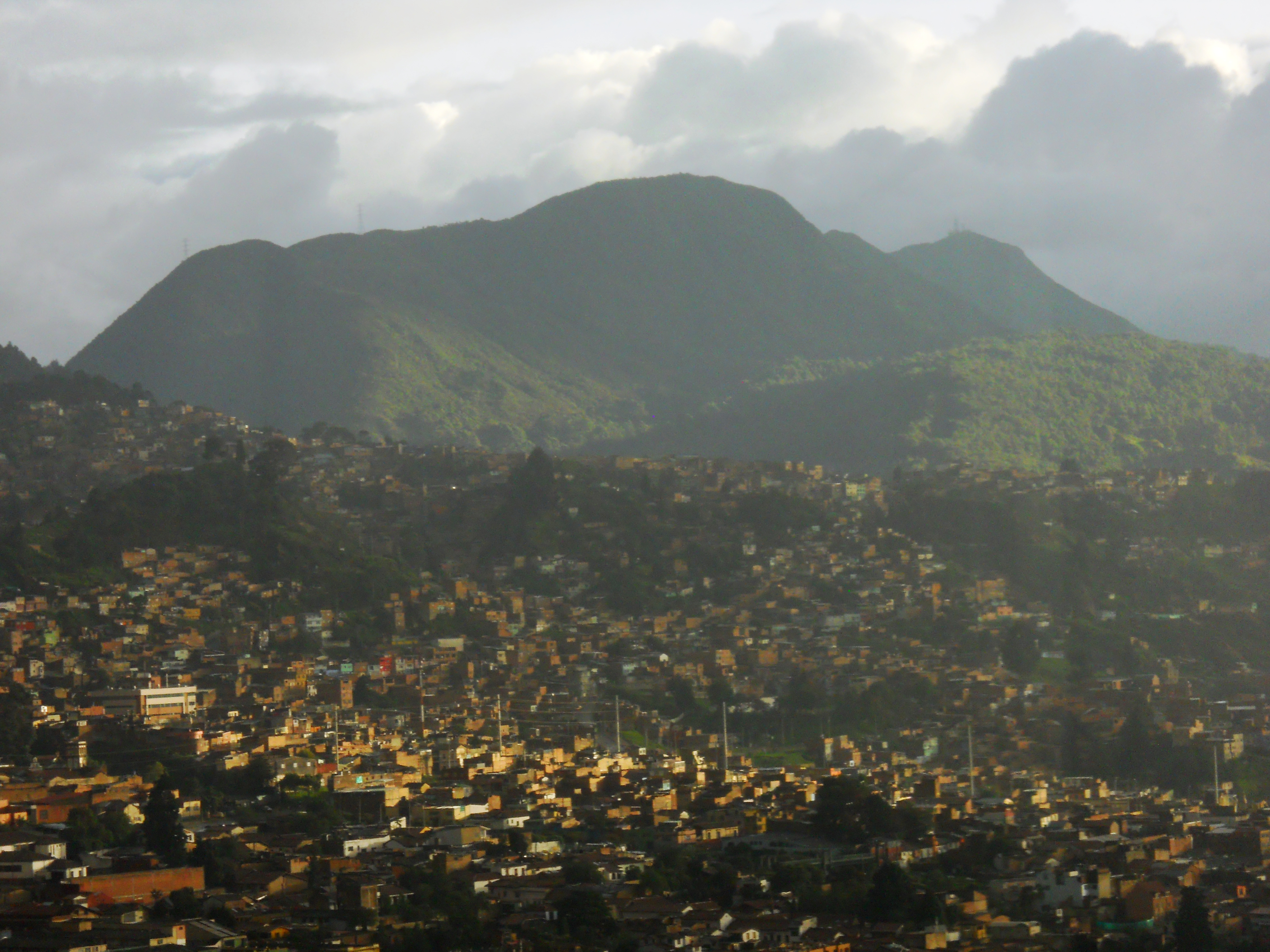 Cerros de Bogotá en el sector de Usme.